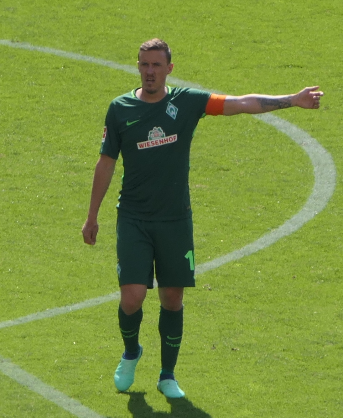 Der Fussballprofi Max Kruse im Trikot vom SV Werder Bremen beim Auswärtsspiel gegen den VfB Stuttgart am 21.04.2018.